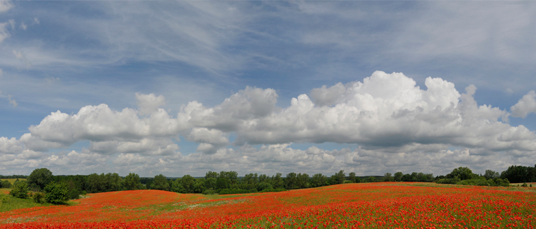 Mazurskie maki